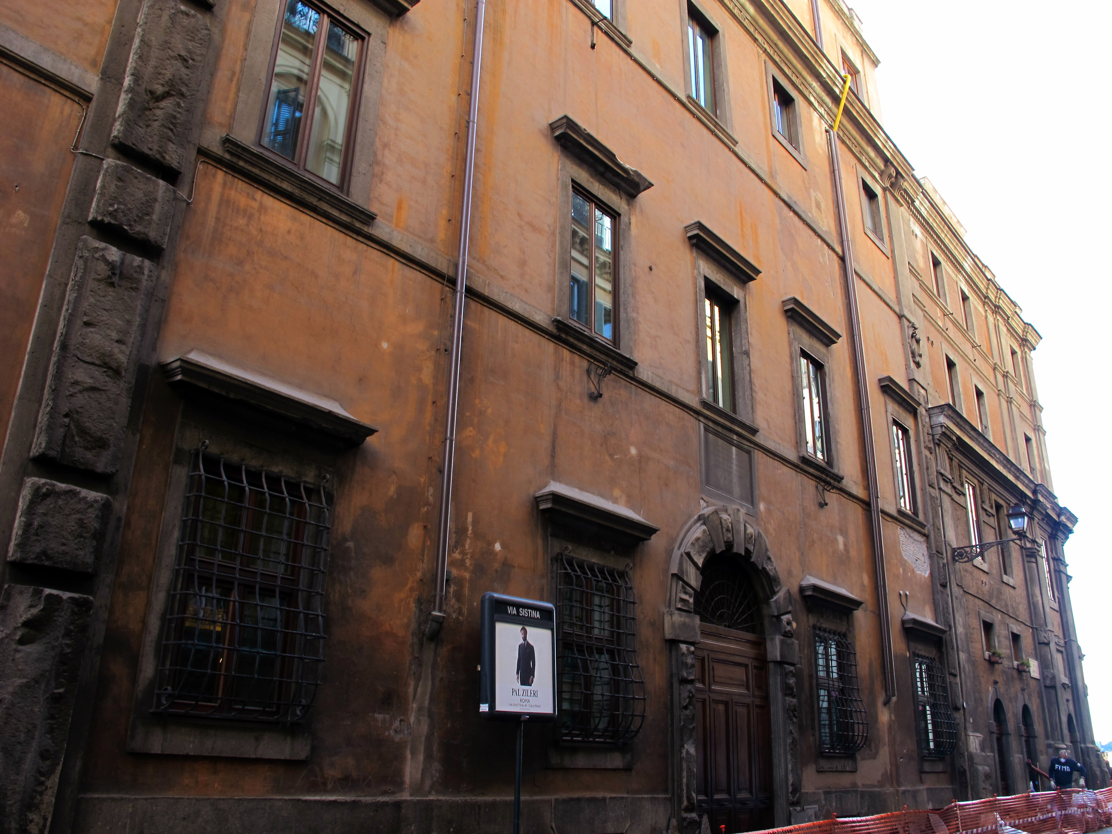 Palazzo Zuccari (Roma)